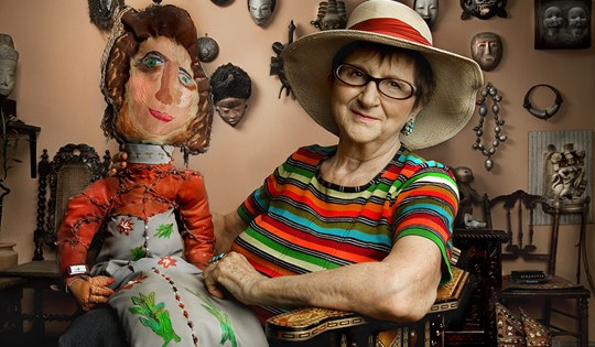 פרופסור לחינוך - רחל אלבוים דרור